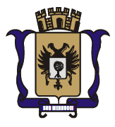 Brasão Sud Menucci